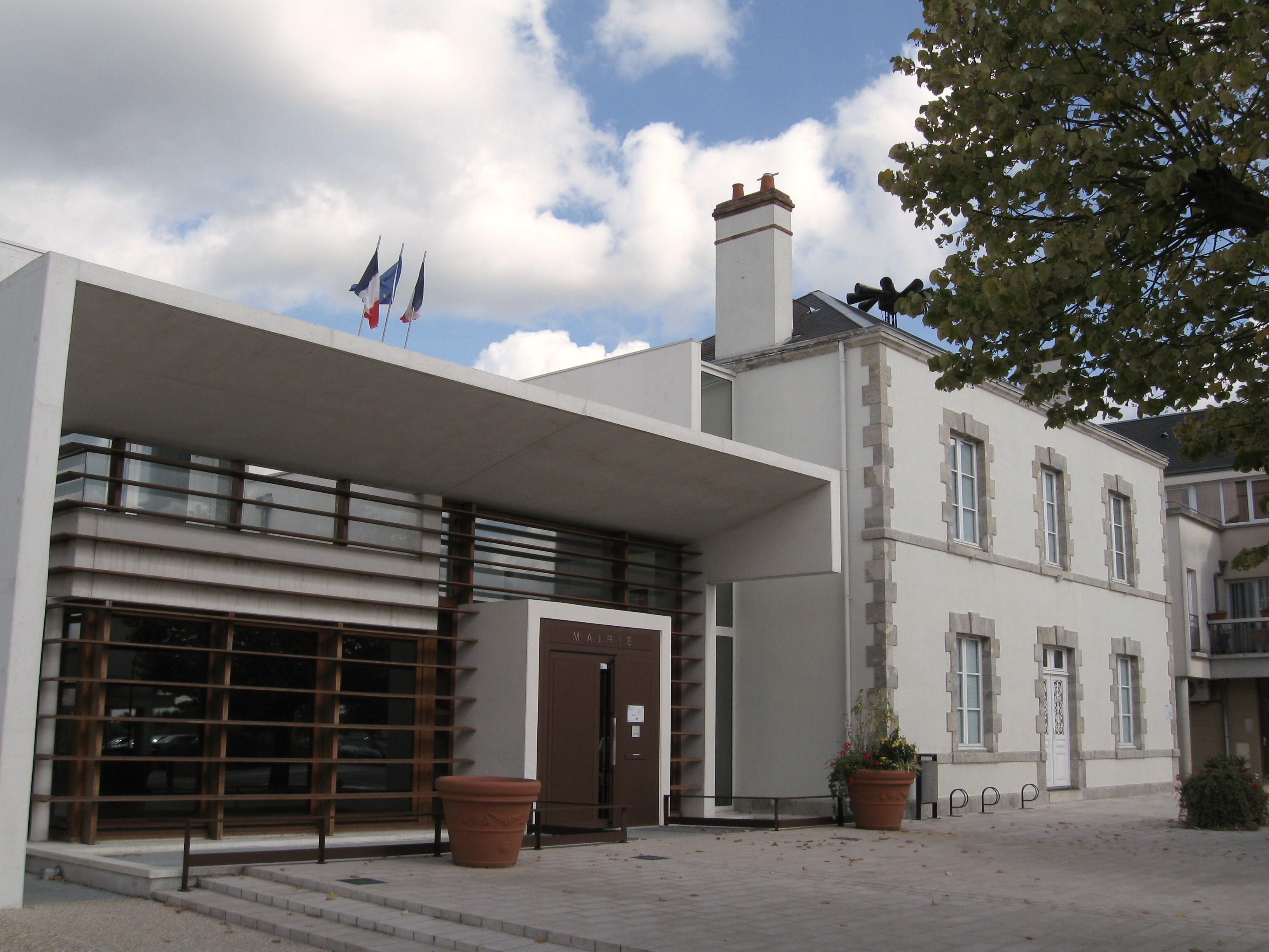 Mairie, Semoy, Loiret, France